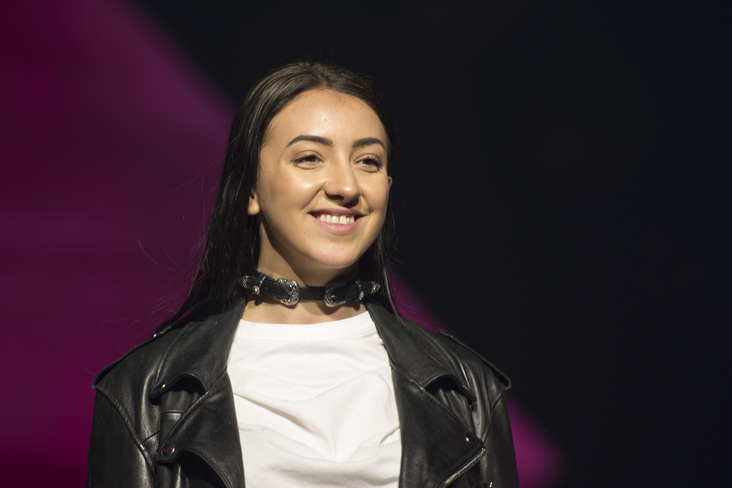 Adrijana Krasniqi på en presskonferens under första deltävlingen av Melodifestivalen 2017 i Göteborg.